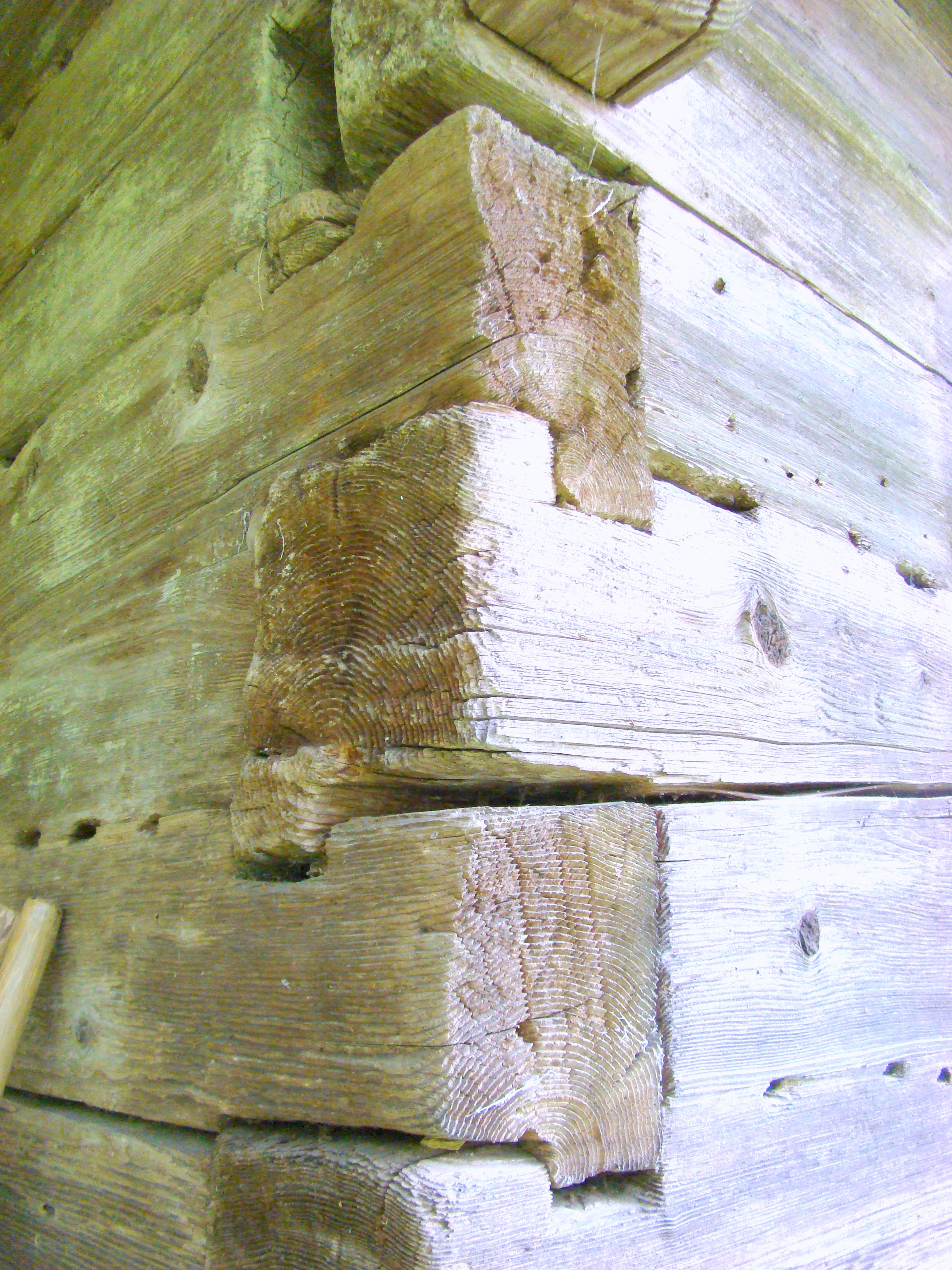 Biserica de lemn "Cuvioasa Paraschiva" , sat POIENILE IZEI